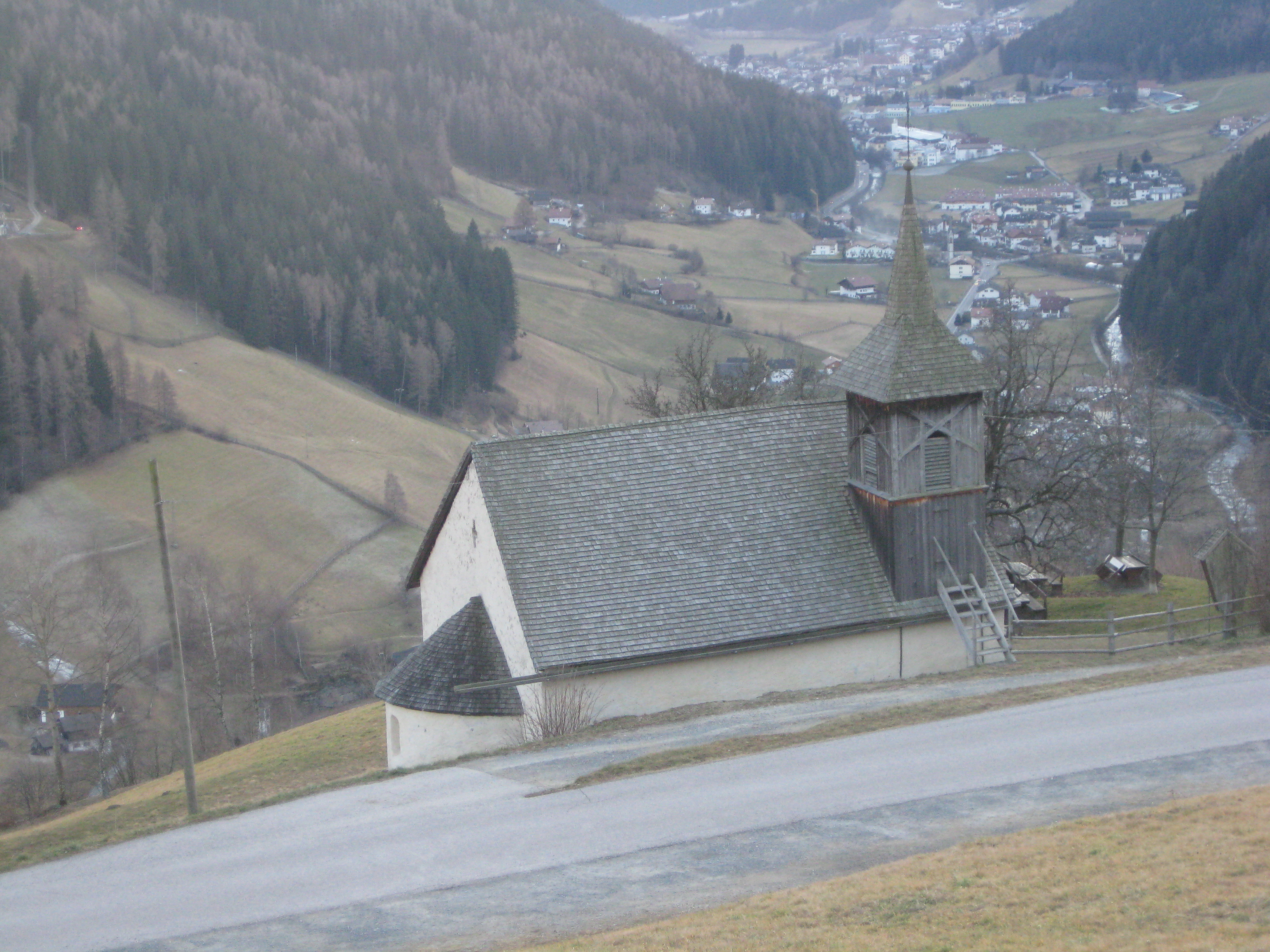 St. Valentin auf Kandelsberg im Sarntal in Südtirol